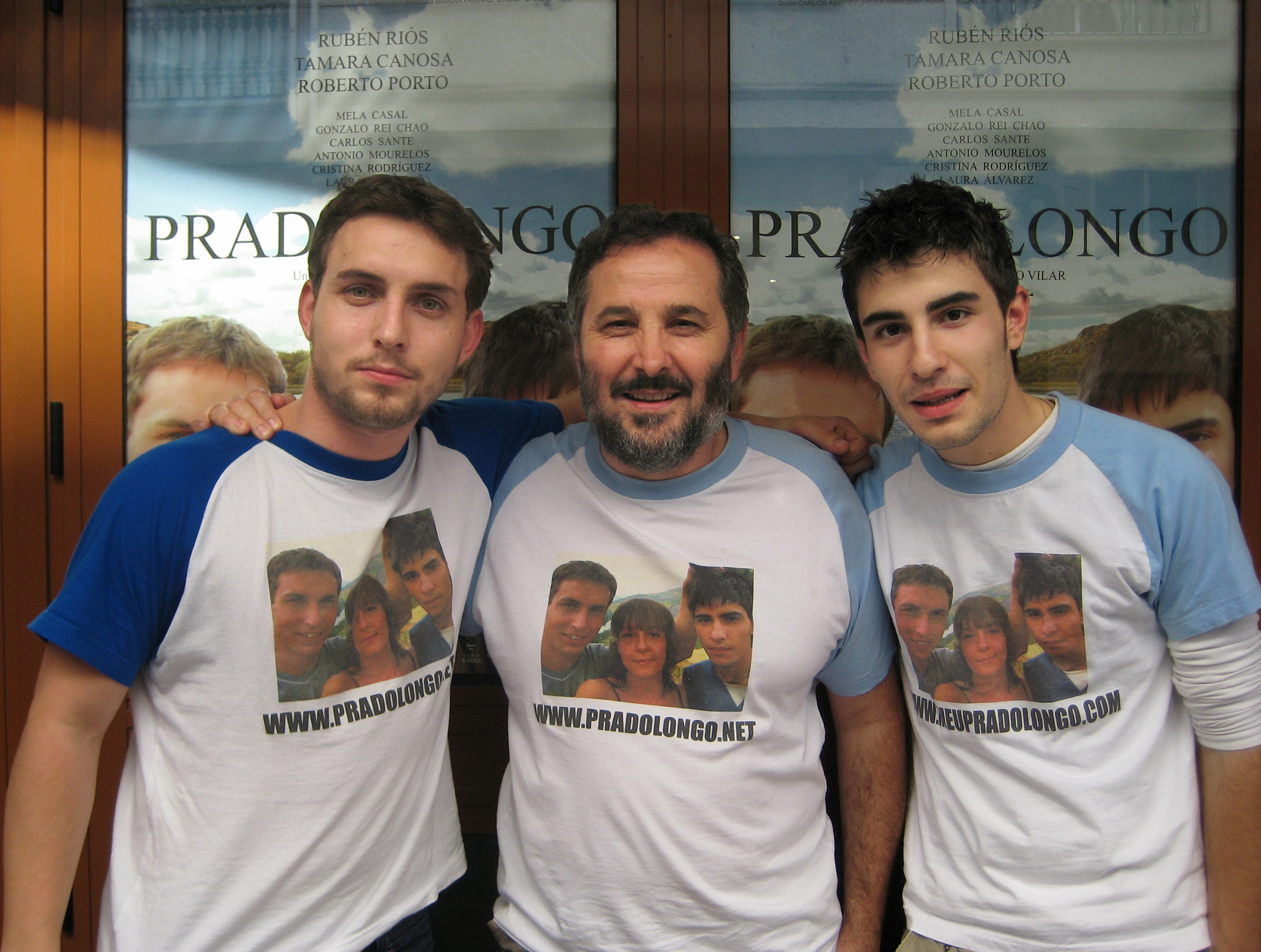 Rubén Riós e Ignacio Vilar e Roberto Porto presentando a película Pradolongo na Estrada. Realizada co permiso dos fotografados.